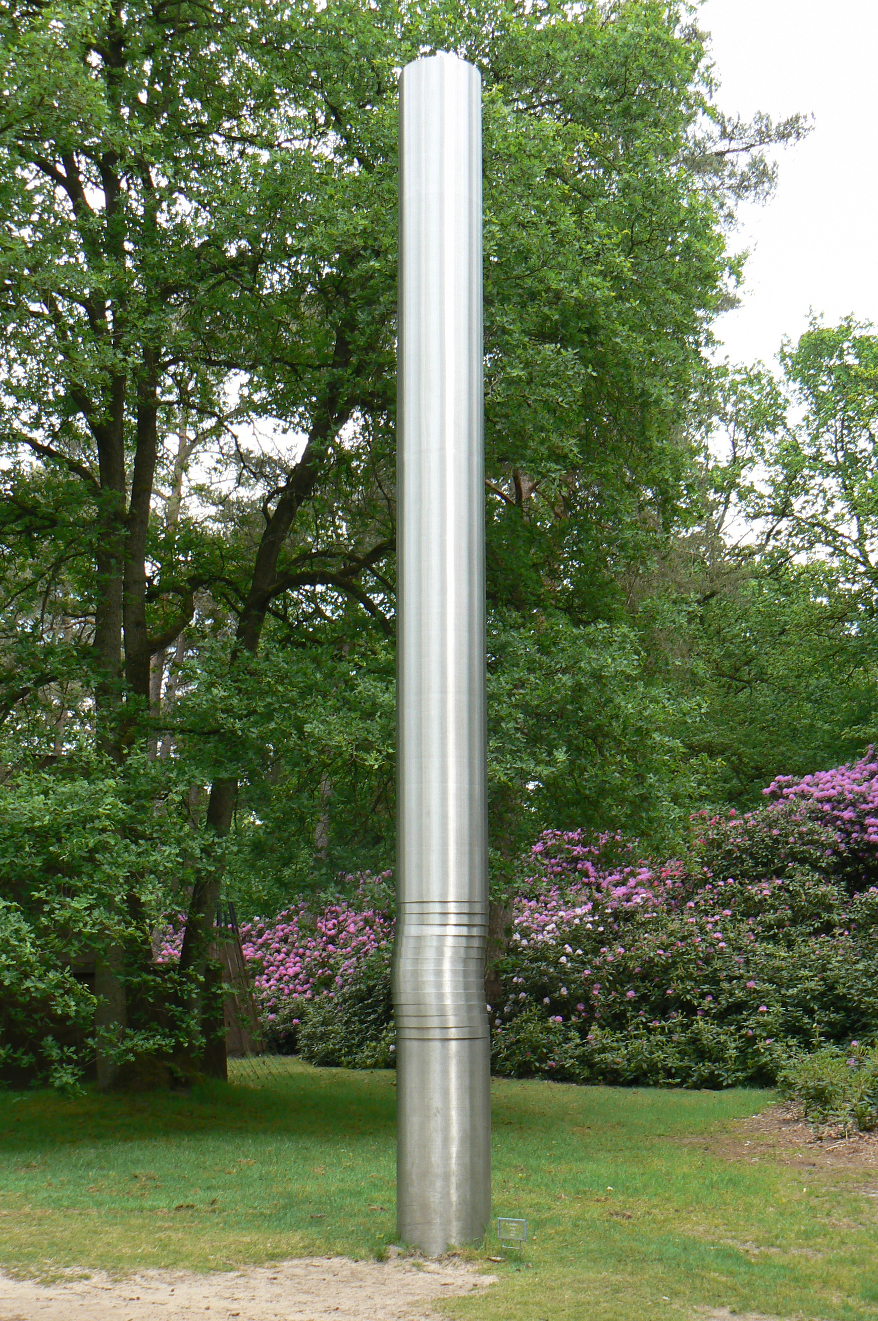 sculpture Zuil (1968) by André Volten in beeldenpark KMM/The Netherlands